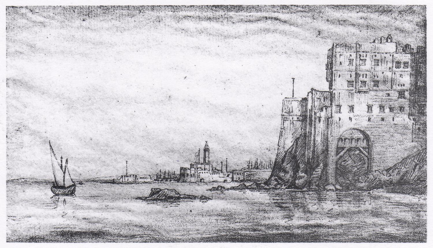 Dessin vers 1830. Le môle d'Alger, et au premier plan, la maison occupée successivement par le maréchal Clauzel, par le consul des Etats-Unis, par la bibliothèque-musée.